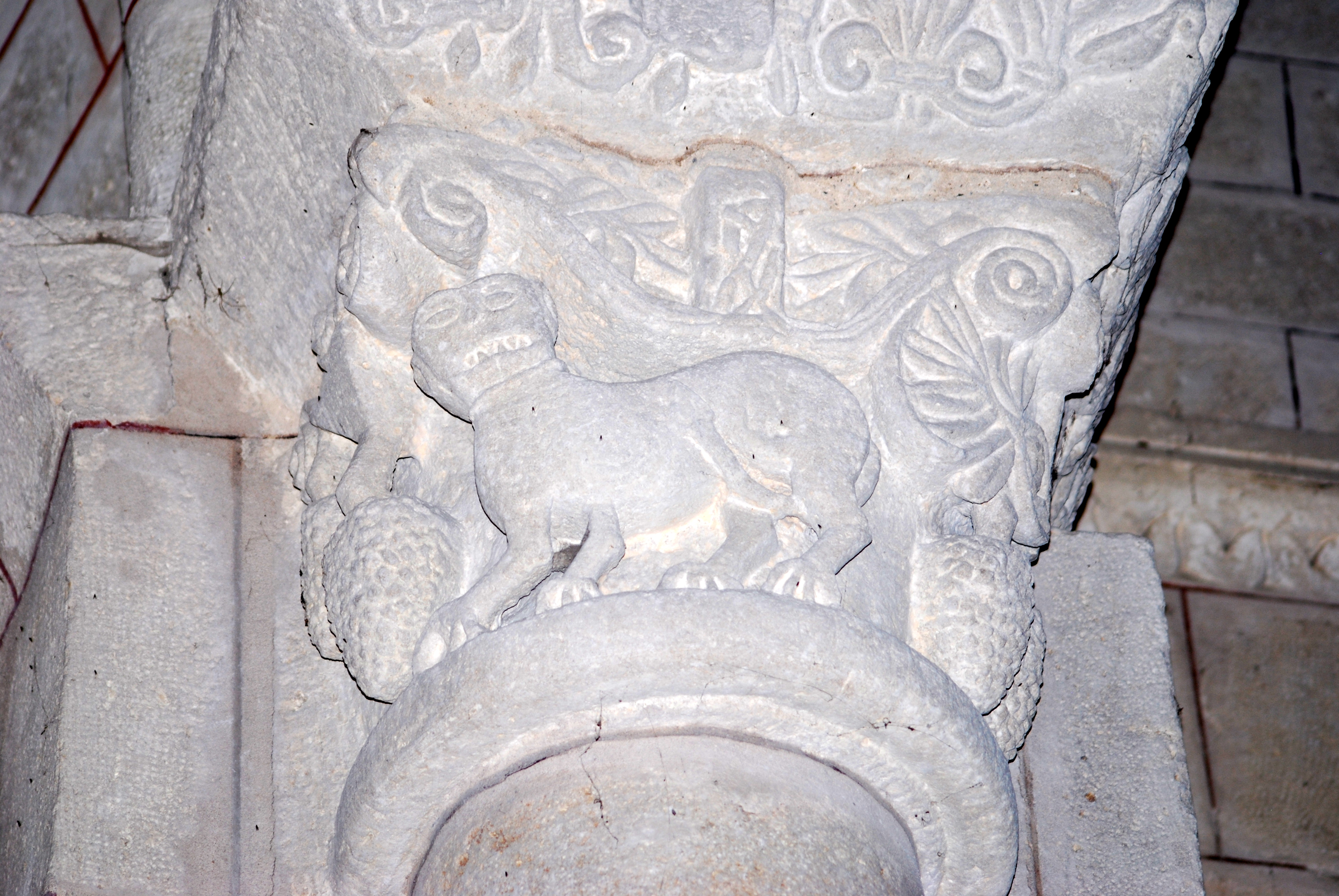 Église Notre-Dame de Doulezon